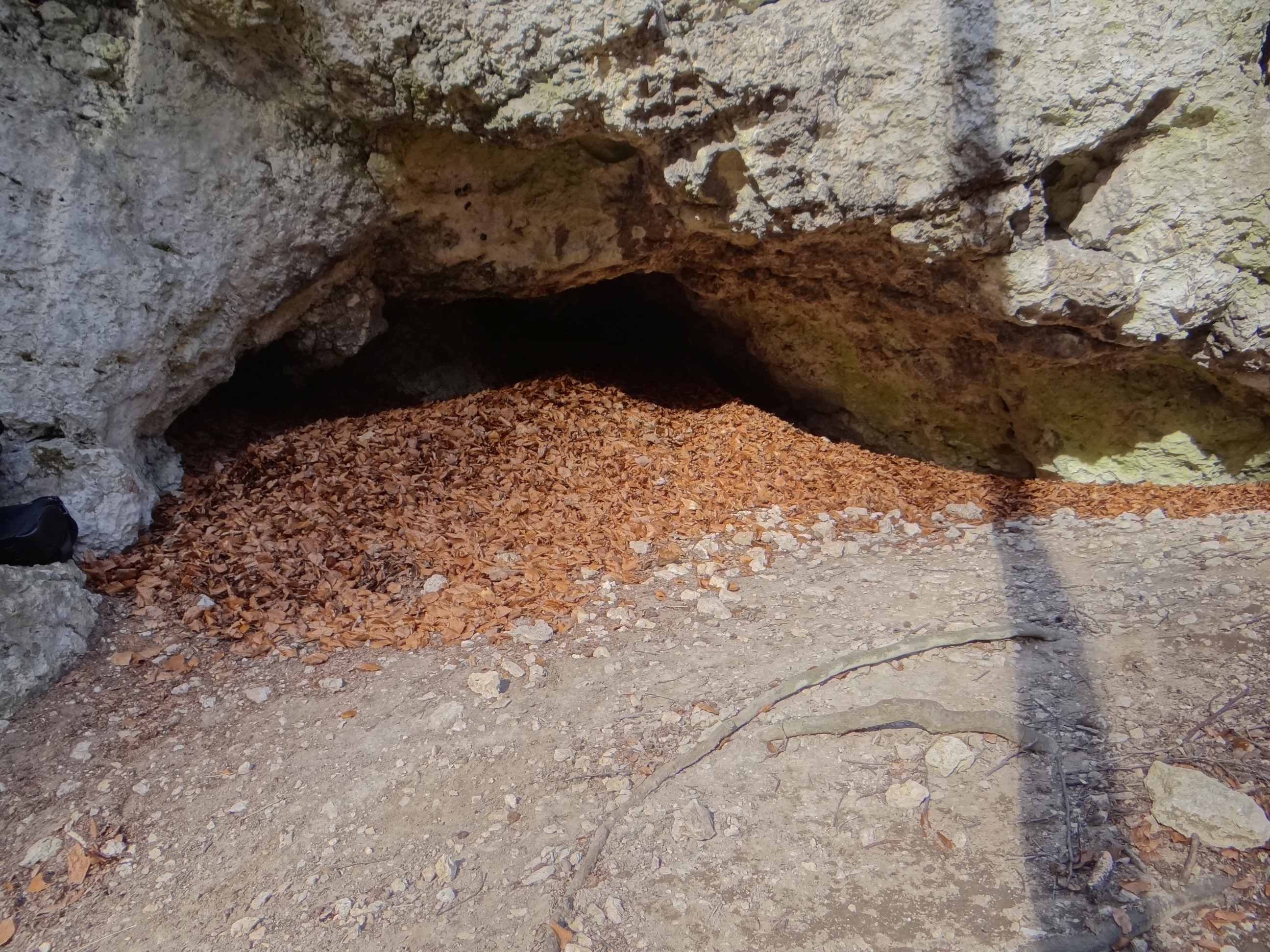 Schronisko Żarskie II w Dolinie Racławki